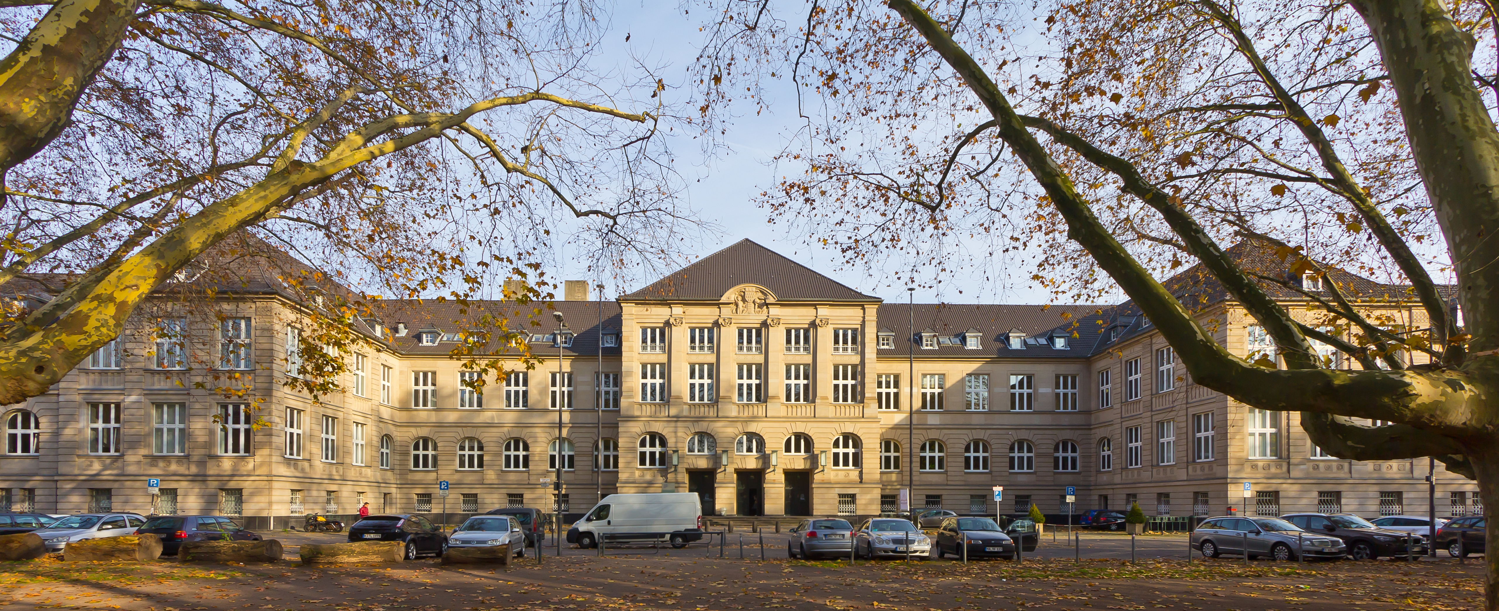 Gebäude der Alten Universität, Claudiusstraße 1, Köln. Heutige Nutzung: Fachhochschule Köln - Campus Südstadt, GWZ Foto: Haupteingang/Front